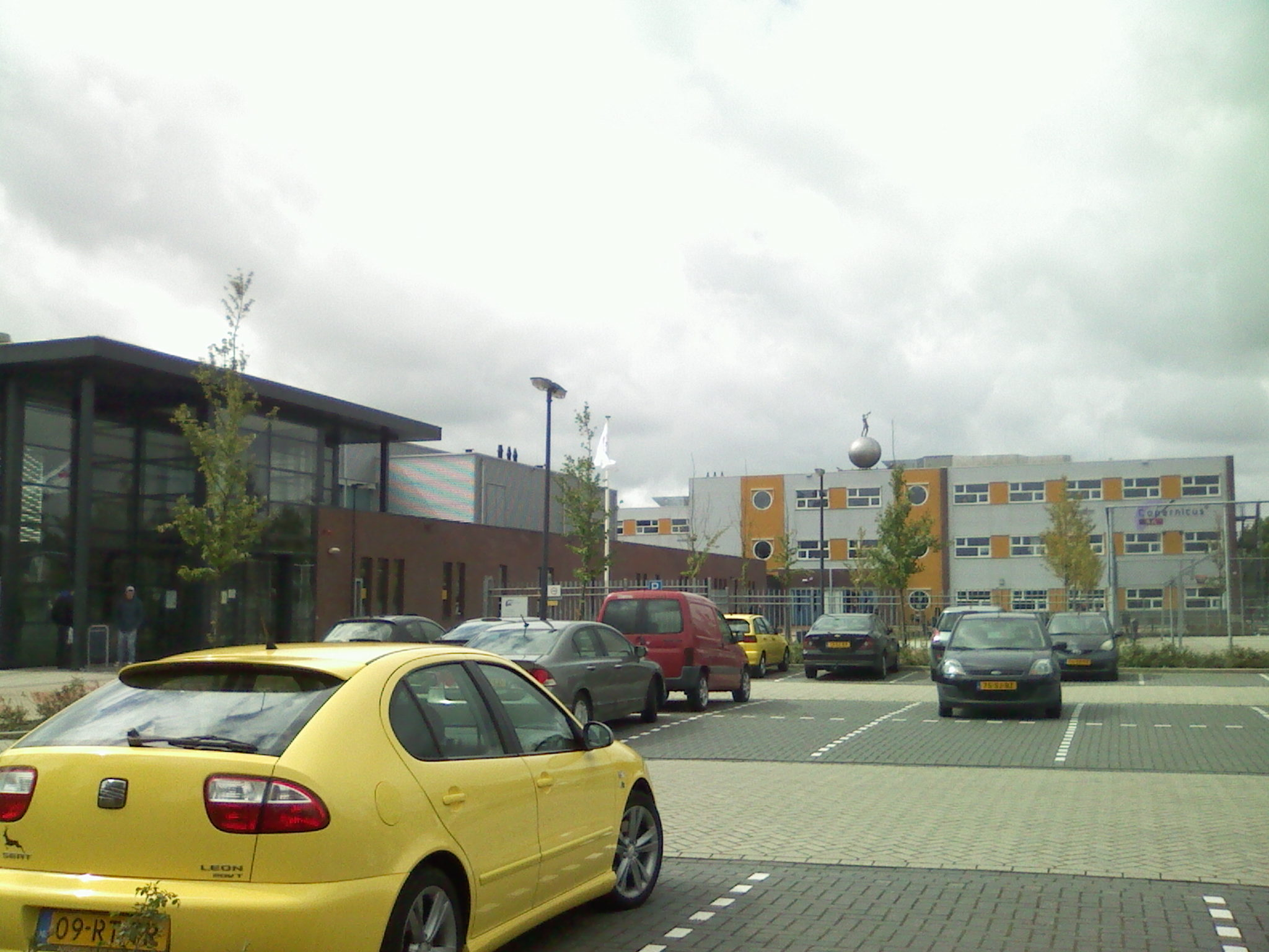 Nieuwe gebouw van de Copernicus in Hoorn. Gebouw staat aan de Nieuwe Steen.